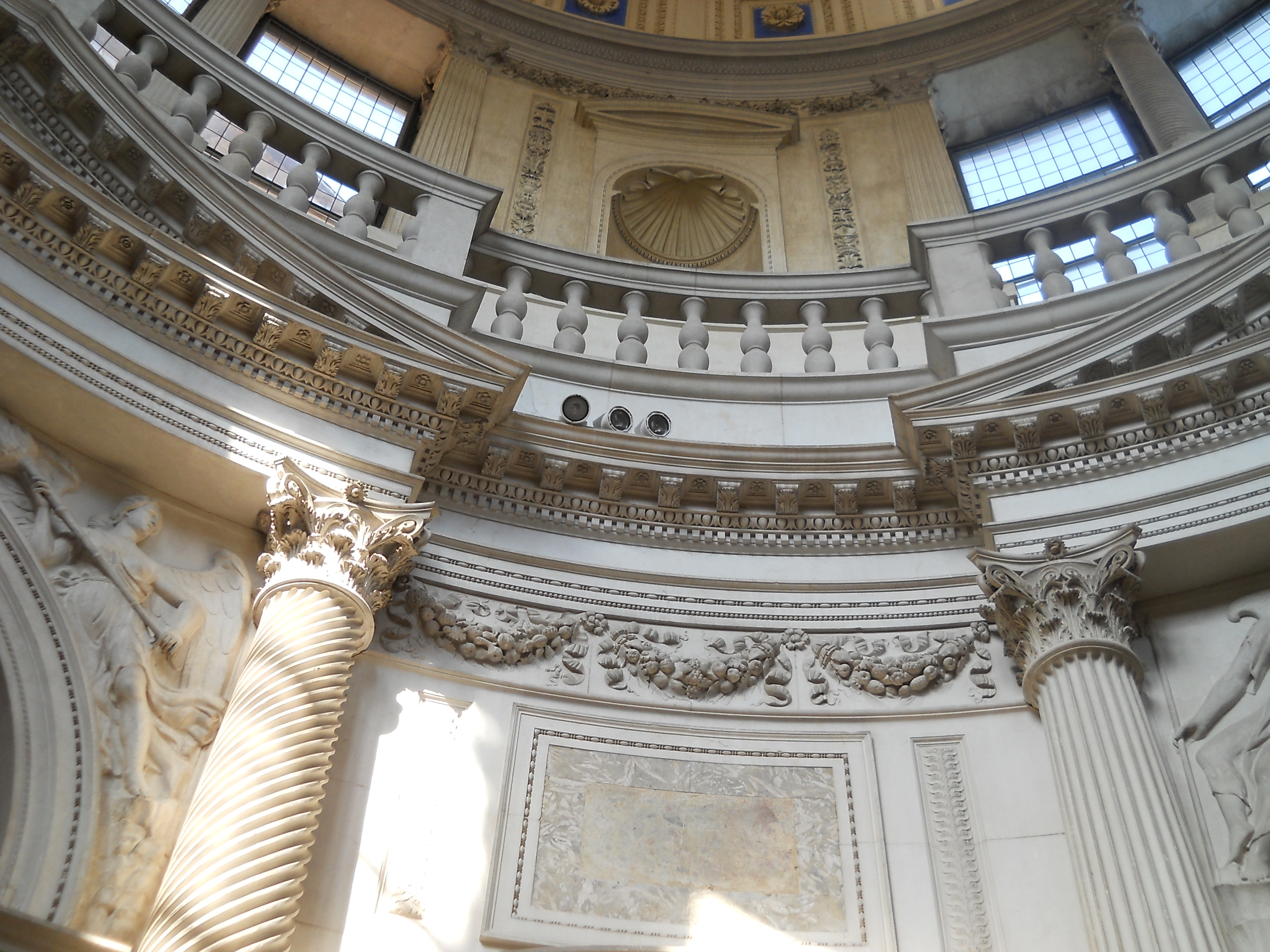 Cappella Pellegrini presso la chiesa di San Bernardino a Verona (autore: Michele Sanmicheli)